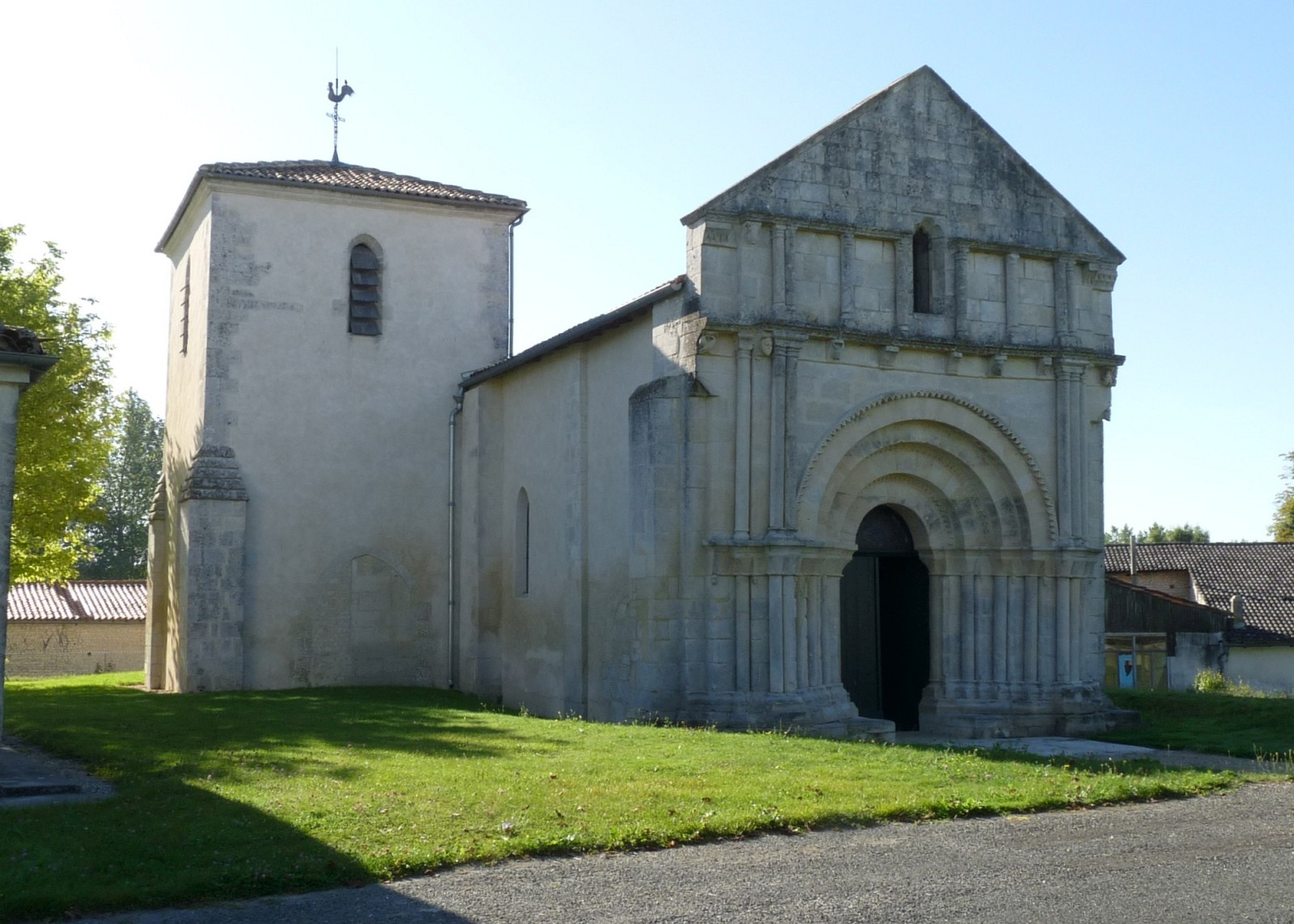 Eglise de Coulonges, Charente-Maritime, France